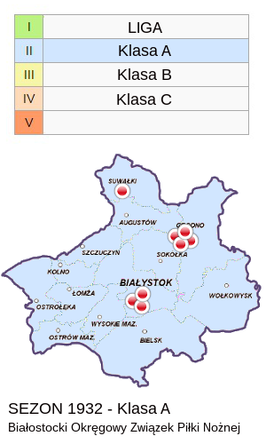 Jagiellonia w sezonie 1932 - mapa